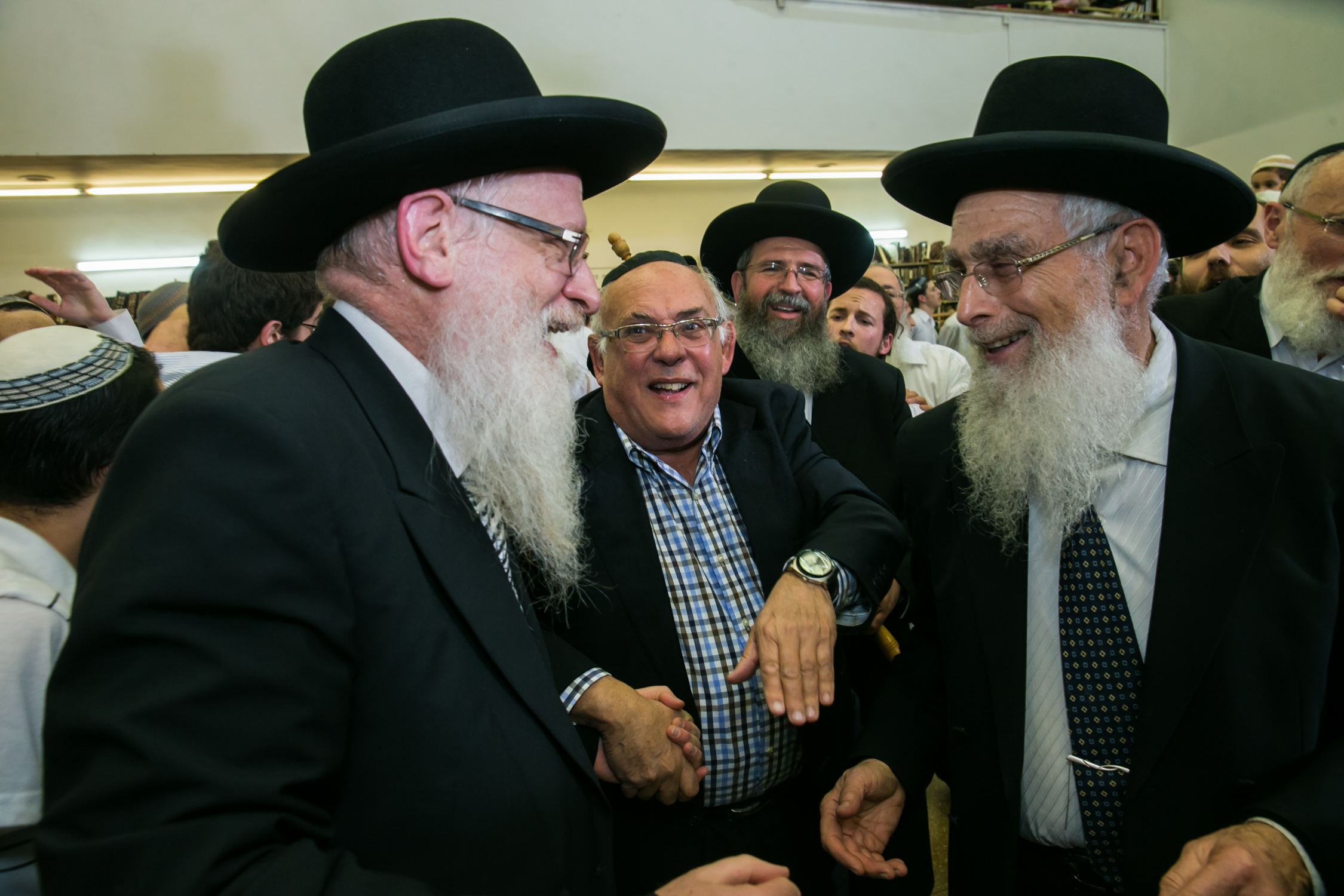 הרב יעקב אריאל בhe:הכנסת ספר תורה בישיבת מרכז הרב יחד עם הרב יהושע מגנס